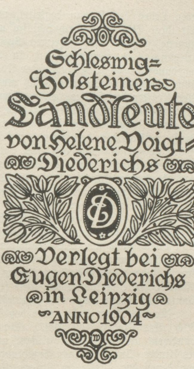 Helene Voigt-Diederichs Schleswig-Holsteiner Landleute, Leipzig 1904 (zuerst 1898), Titel von Emil Rudolf Weiß